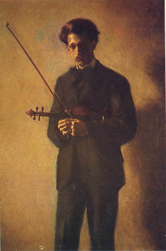 Retrato